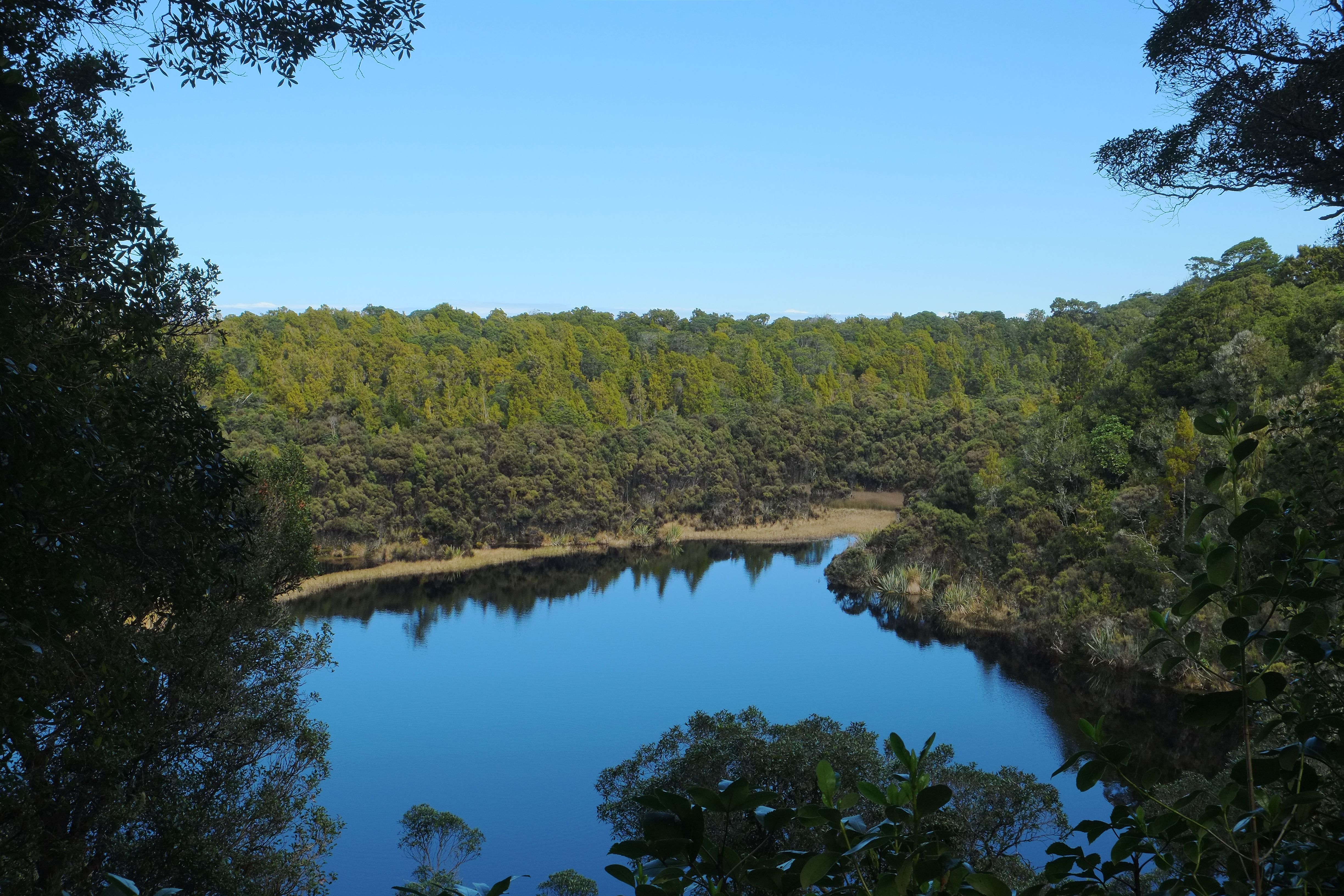 View over Lake Wilkie